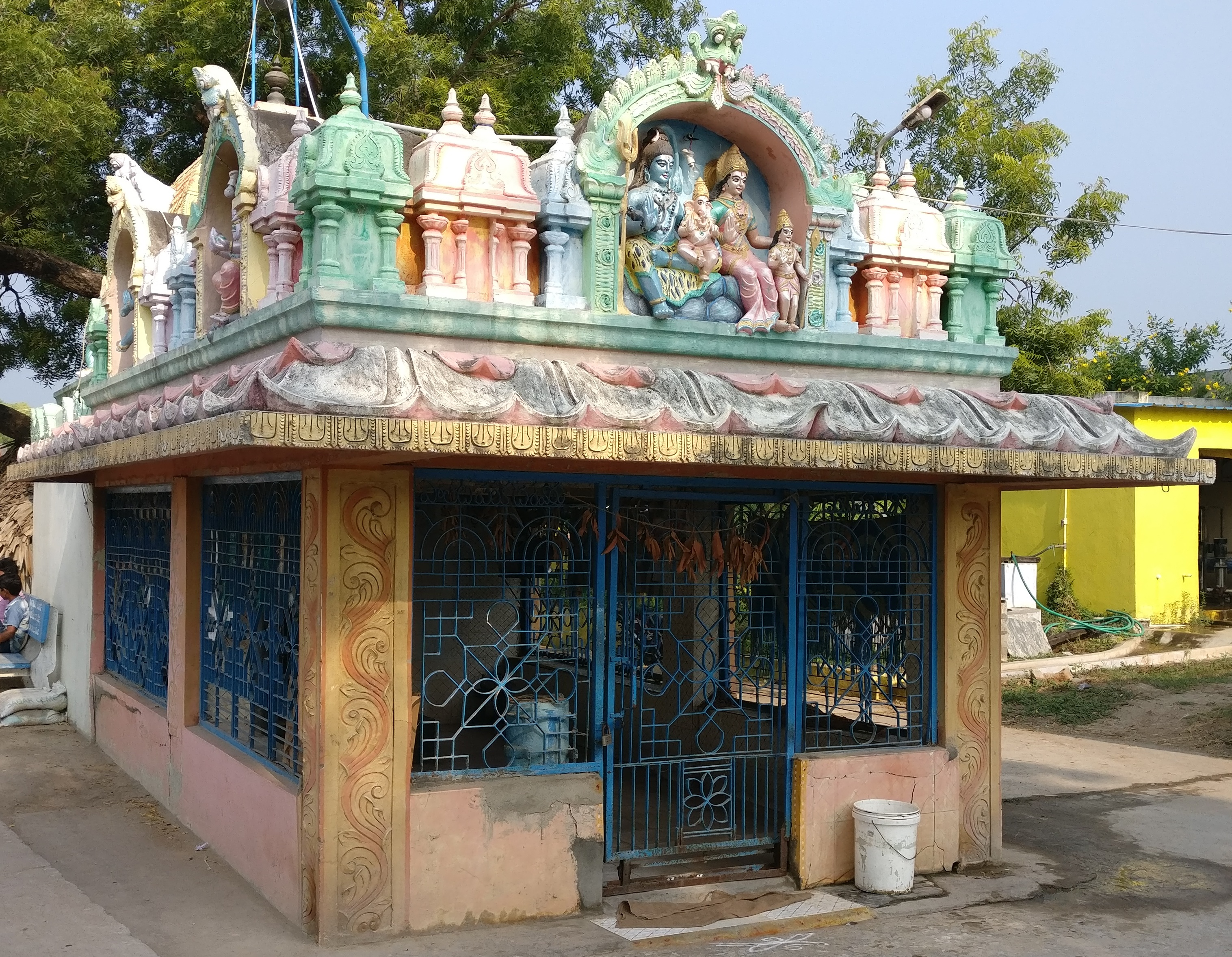 గ్రామంలో వేంసేసియున్నటువంటి బాలవినాయకుని గుడి 1968వ సంవత్సరం గుంటుపల్లి సుబ్బమ్మ గారి కోరిక మేరకు జంపని పెద రాఘవయ్య గారు ప్రతిష్ఠ జరిపినారు. నిత్య దూప, దీప నైవేద్యాలు మరియు ఉత్సవాలు జరుపుట కొరకు కొంత మాన్యం మరియు కొంత డబ్బు ఇచ్చారు. ఈ గుడి నిర్మాణంలో జంపని శేషయ్య విశేష కృషి చేసి, ‘ఉడతాభక్తి’గా ఇప్పటికీ స్వామివారికి సేవలందిస్తున్నారు. ఈ ప్రతిష్ఠ కార్యక్రమంలో గుంటుపల్లి, కంఠమనేని, జంపని వంశస్తులూ పాల్గొని గుడి నిర్మాణంలో భాగాస్వాములైనారు.